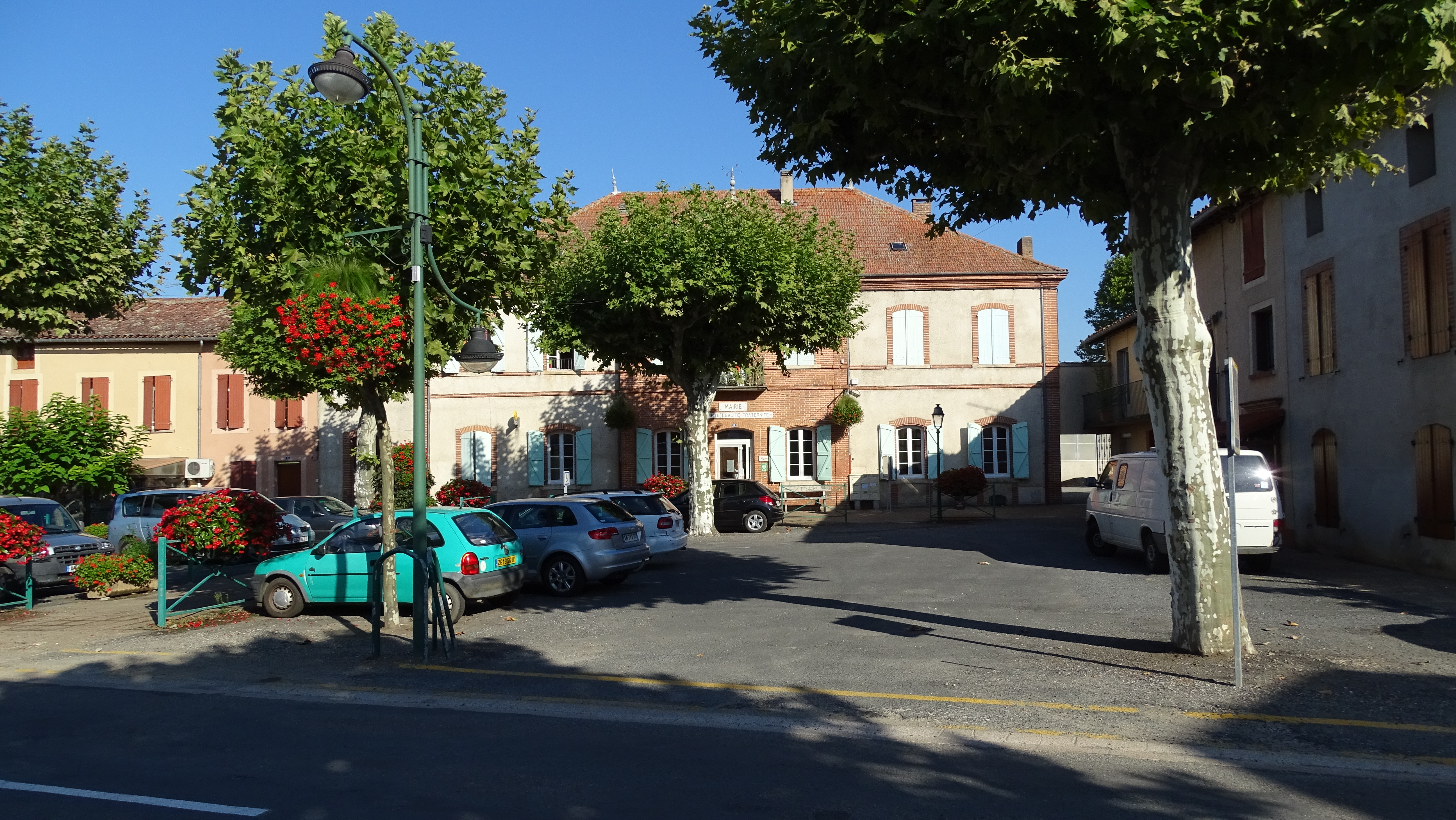 Mairie de Brens dans le Tarn